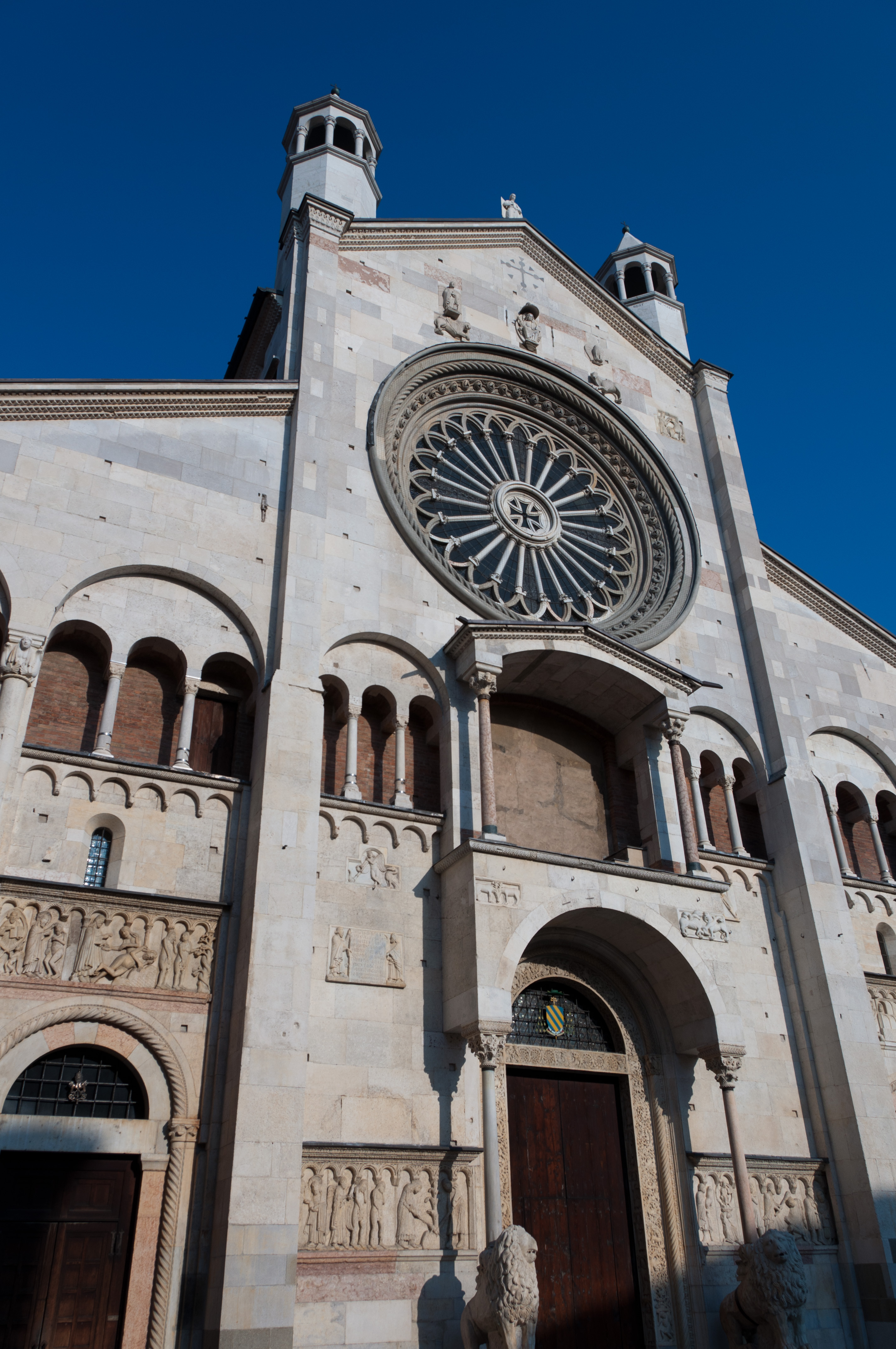 Duomo This is a photo of a monument which is part of cultural heritage of Italy.